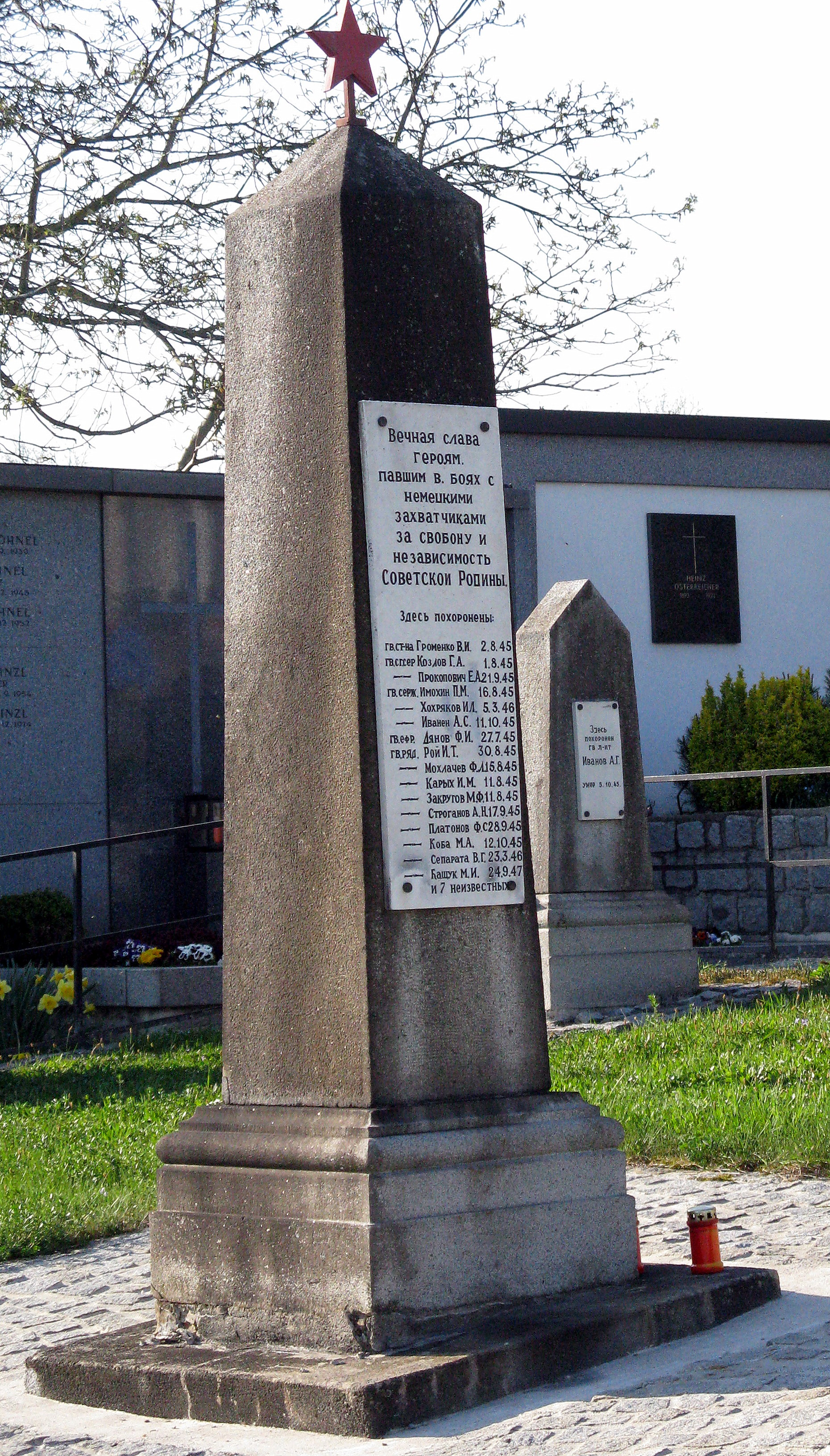 Gedenkstein auf dem russischen Soldatenfriedhof in Perg